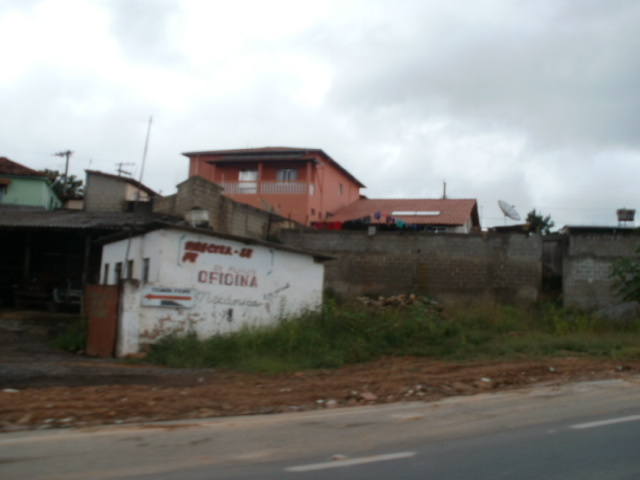 Itutinga, Minas Gerais, Brasil.